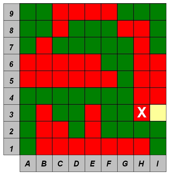 grille de crops - niveau de difficulté important. La grille donne les zones de couleurs des pions (40 rouges 40 verts et un noir).